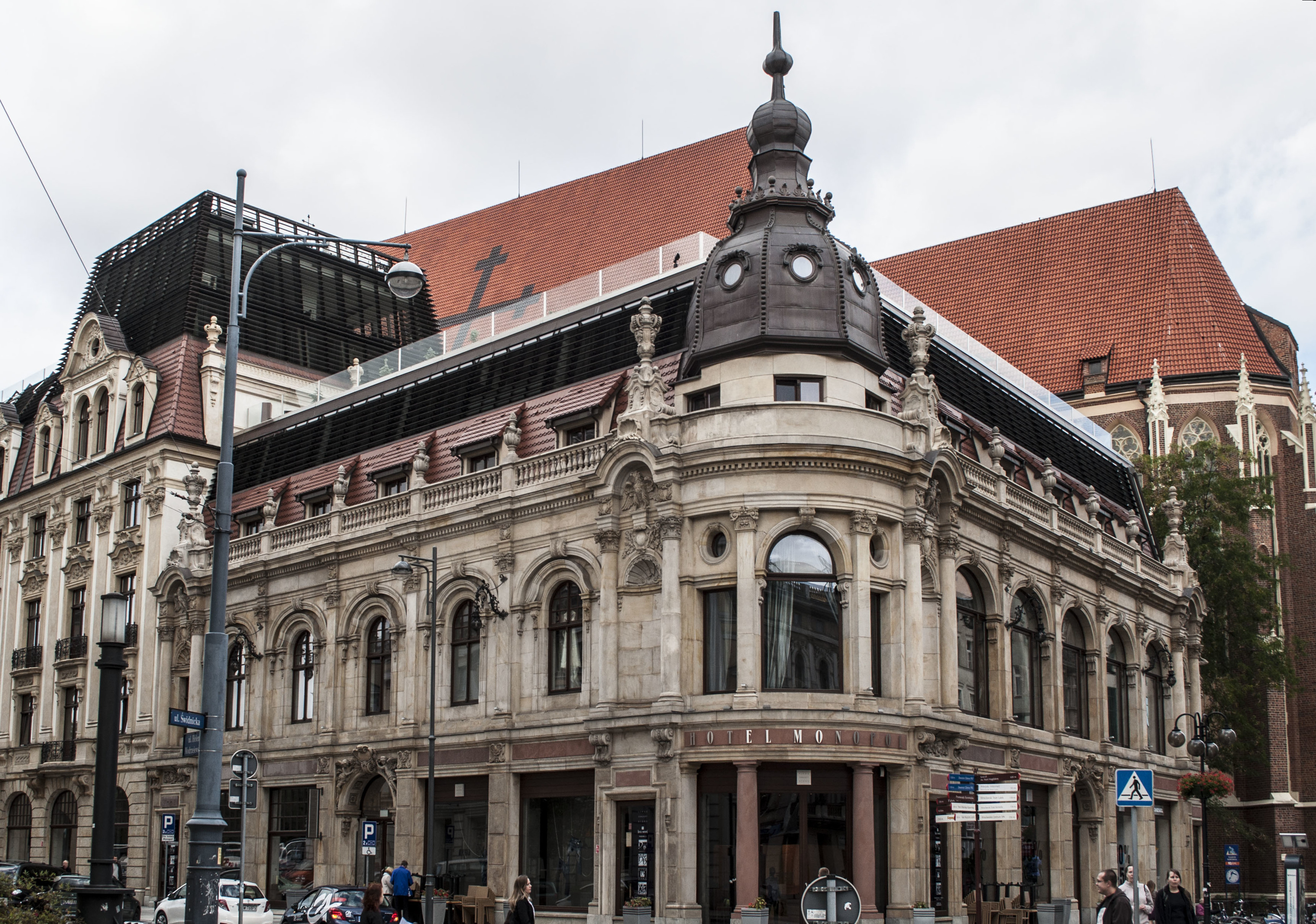 Wrocław Stare Miasto. ul. Modrzejewskiej 2 (Świdnicka 33) - Hotel Monopol wraz z działką 25/1 (zabytek nr 259/431/Wm)